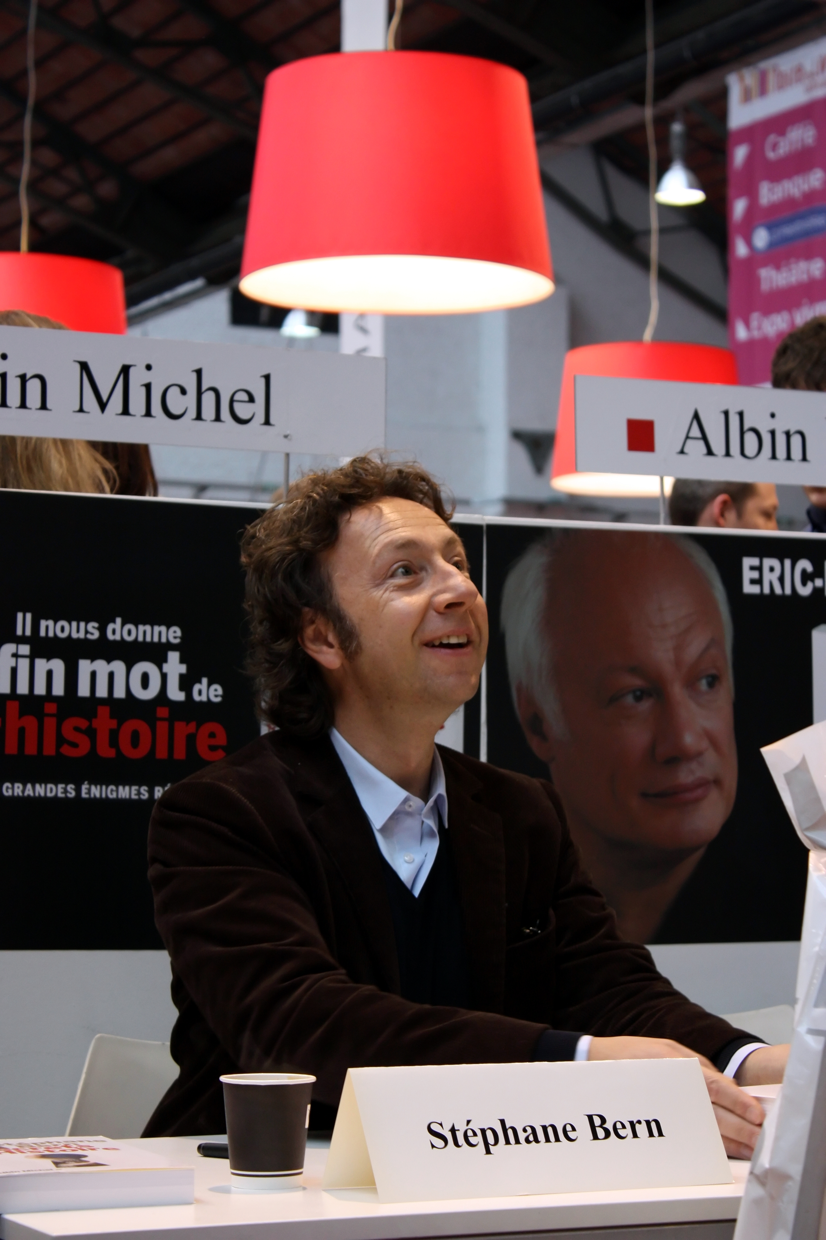 Stéphane Bern durant une séance de dédicace lors de l'édition 2011 de la Foire du Livre de Bruxelles.